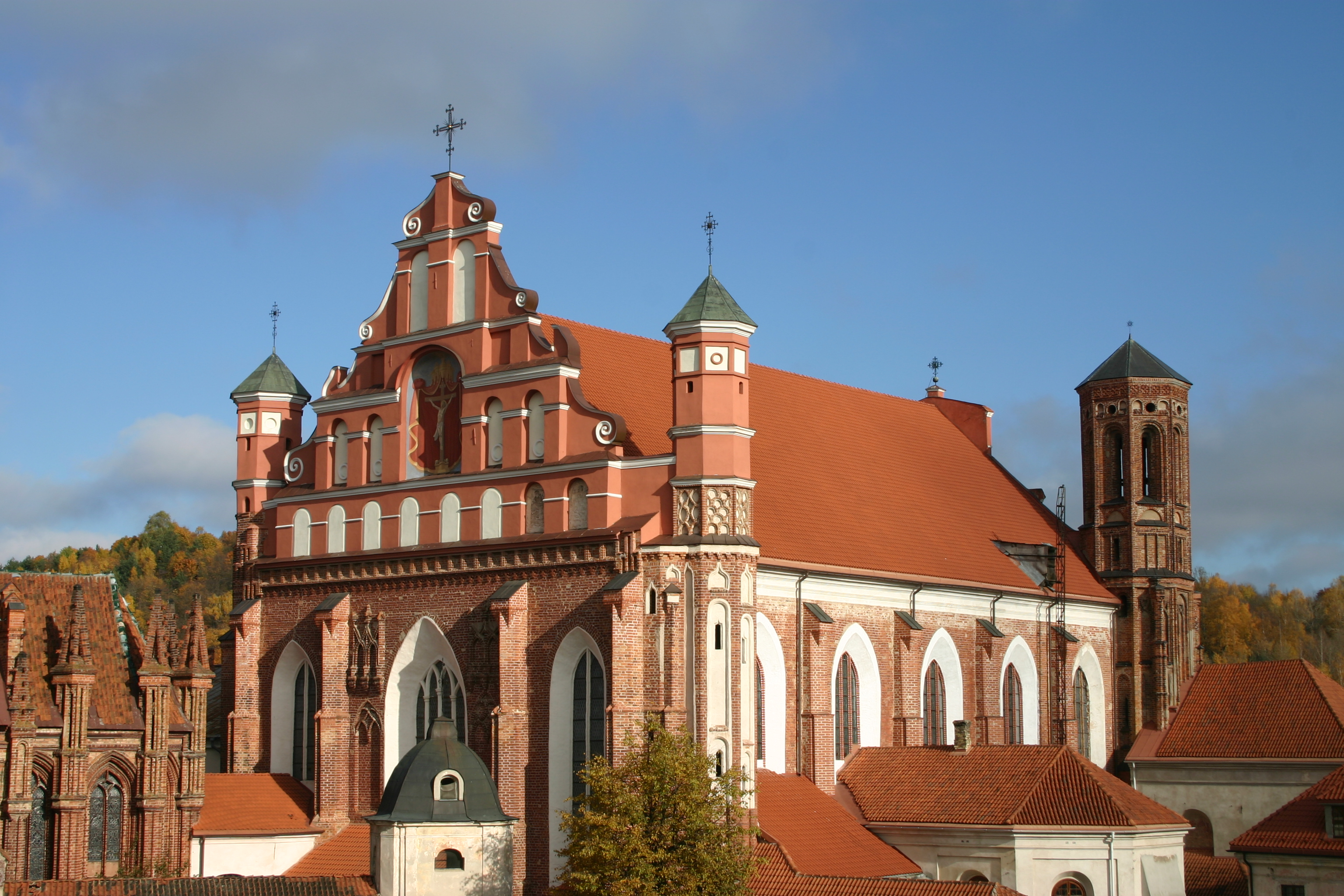 Vilniaus Šv. Pranciškaus ir Šv. Bernardinų bažnyčia